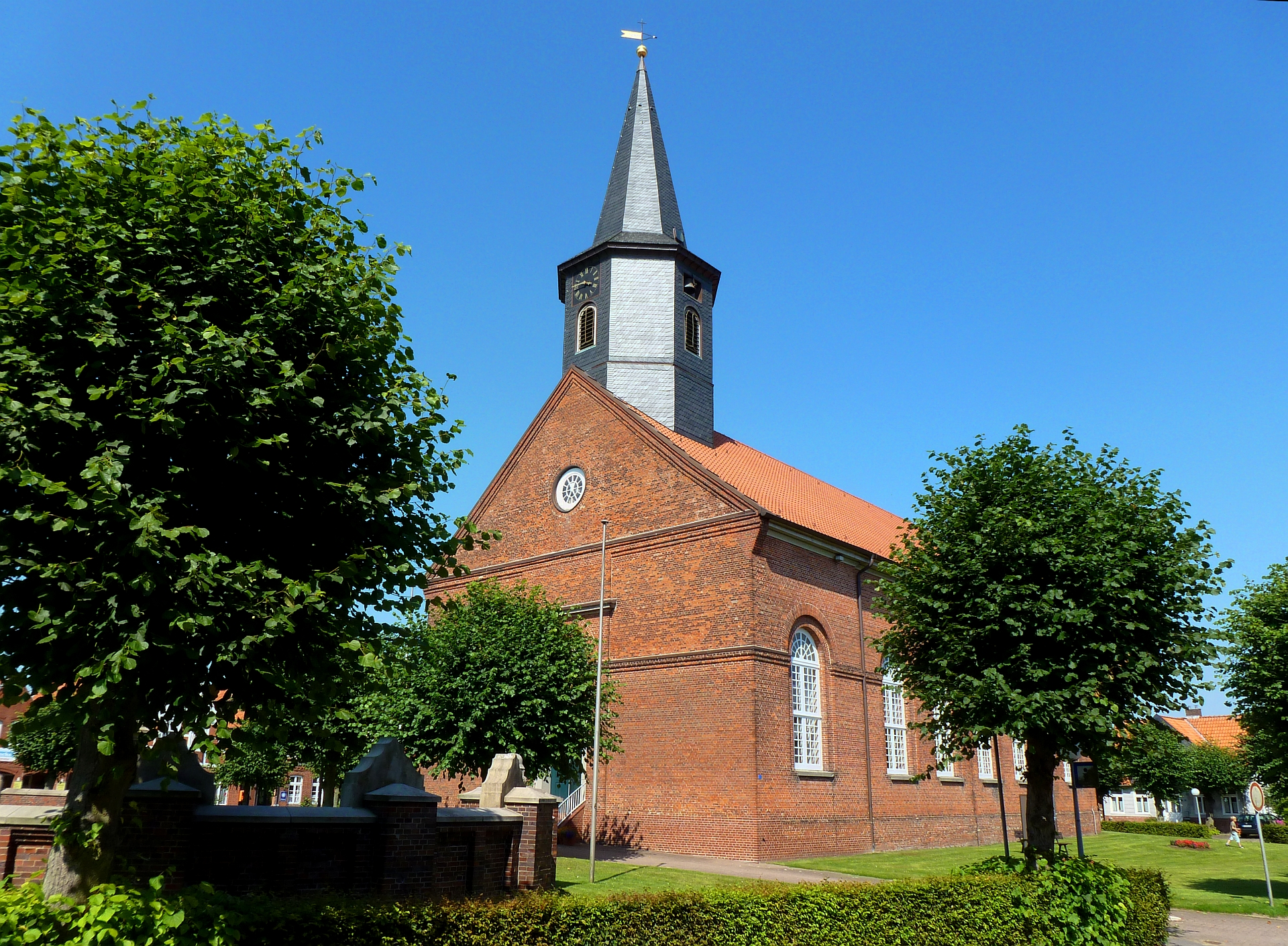 Evang.-Luth. Kirche St. Wulphardi, Neubau von 1835 – 1837. Auf der Kirchwarft stand vormals eine romanische Basilika aus dem 12. Jahrhundert, diese wurde bei der großen Sturmflut in 1825 zerstört. Aufnahmedatum 2015-06.